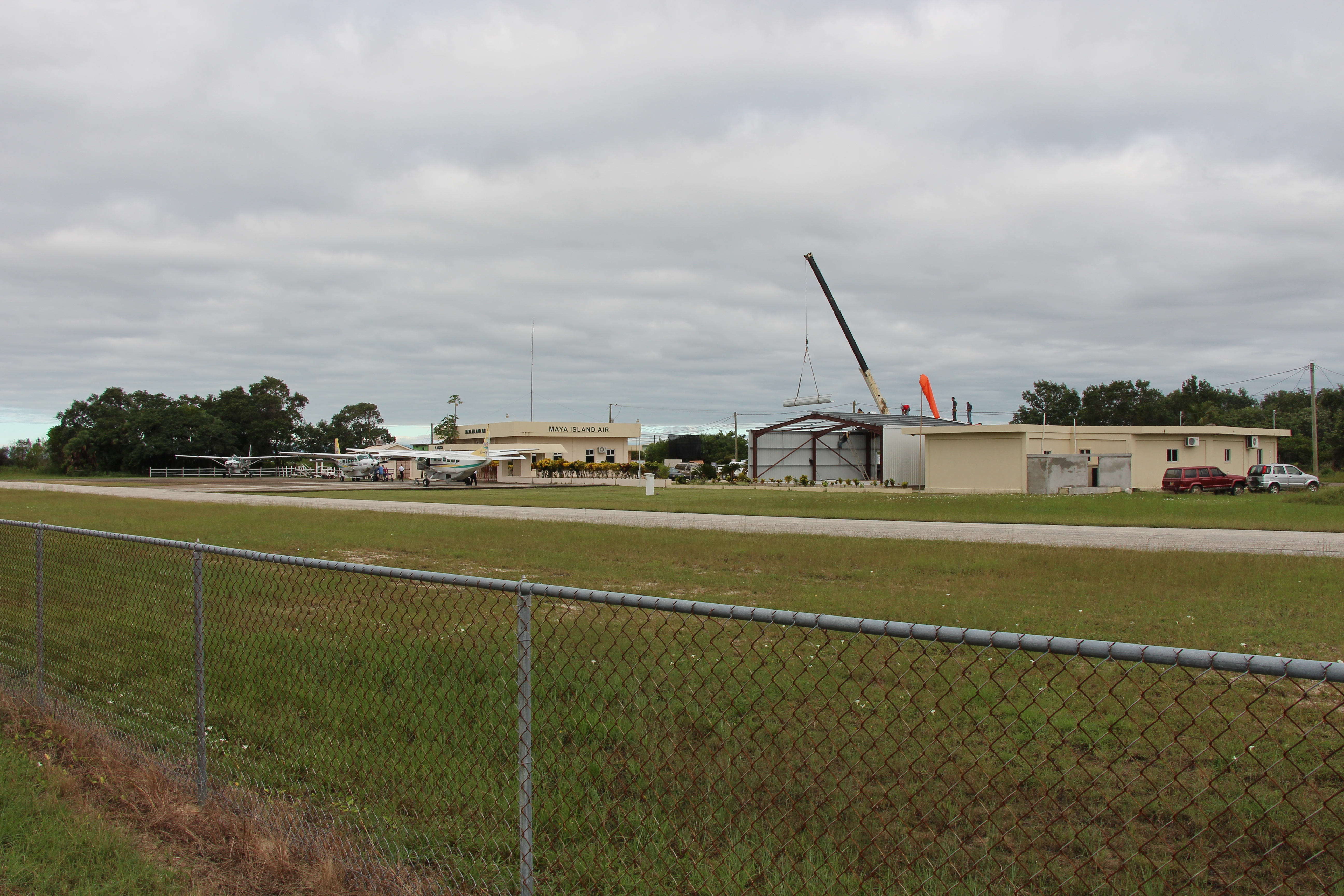 Flughafen Dangriga, Belize